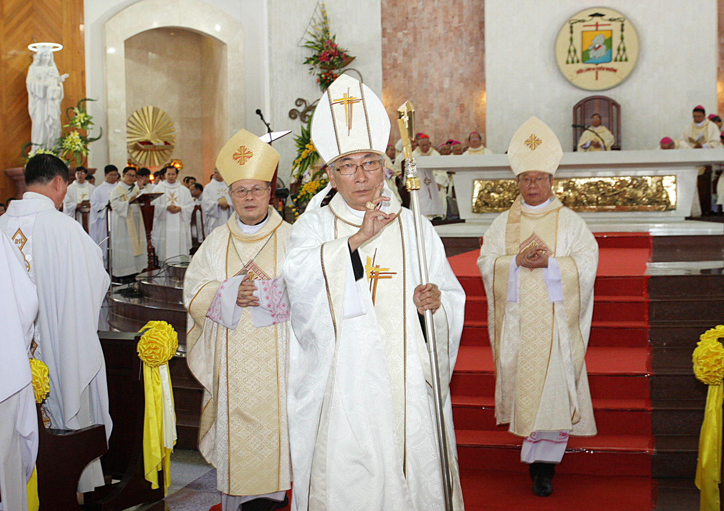 Lễ tấn phong GM Emmanuel Nguyễn Hồng Sơn.